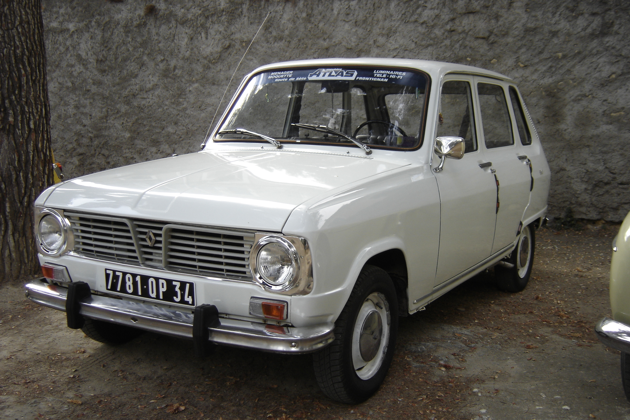 renault 6